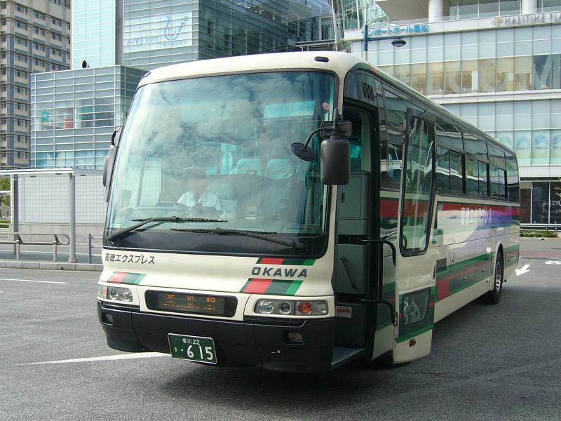 登録番号 香川22き・615 大川自動車所属 高徳エクスプレス号用 2006年10月2日 高松駅前にて撮影 撮影者 Tokatsu kokubu